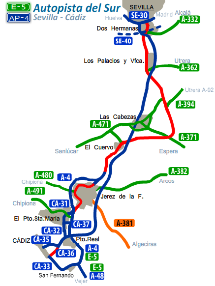 Itinerario y enlaces de la autopista de peaje AP-4